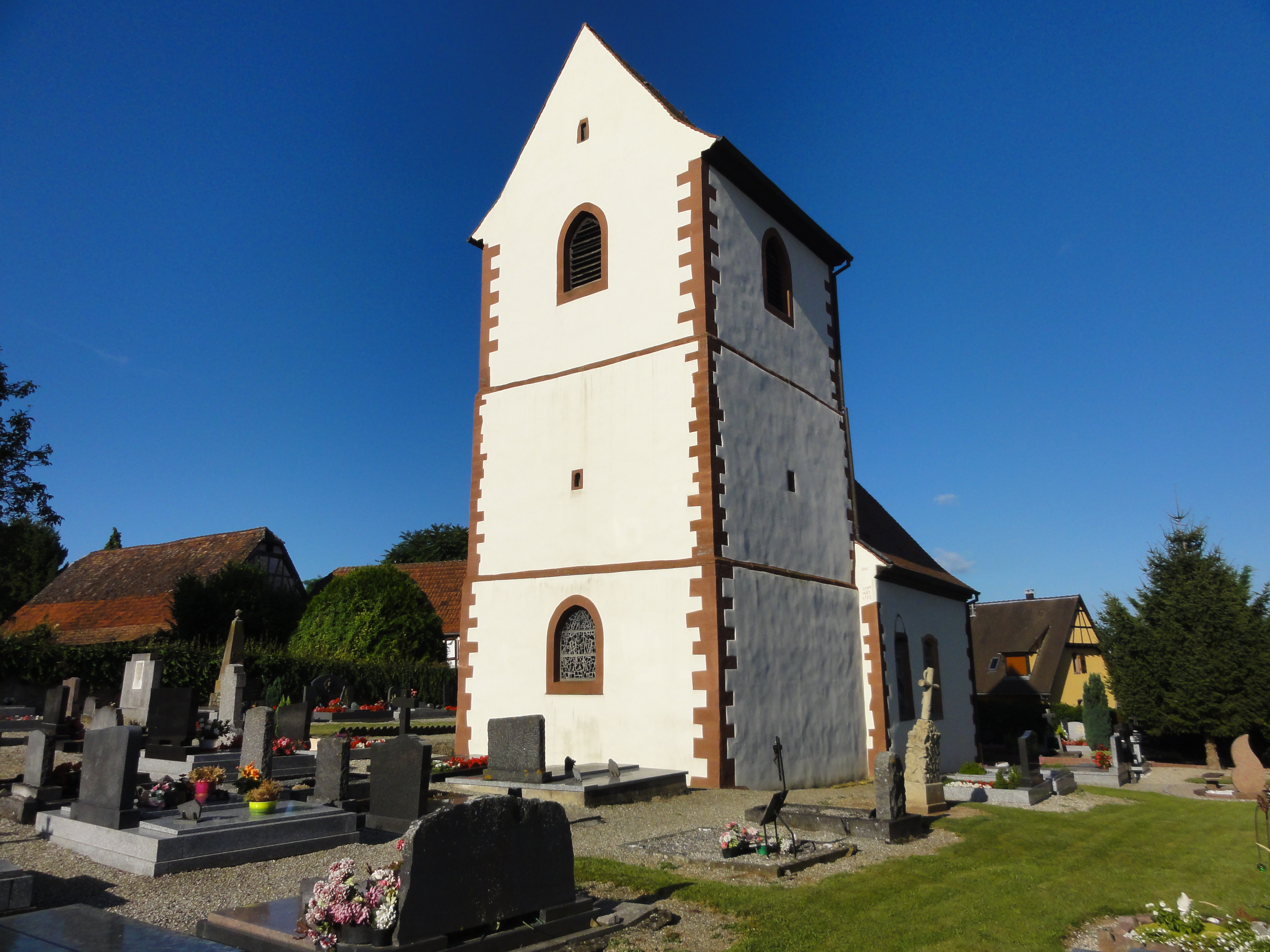 Alsace, Bas-Rhin, Hohfrankenheim, Église protestante (XIIe-XVIIe-XVIIIe).